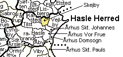 Skejby Sogn , Hasle Herred, Århus Amt